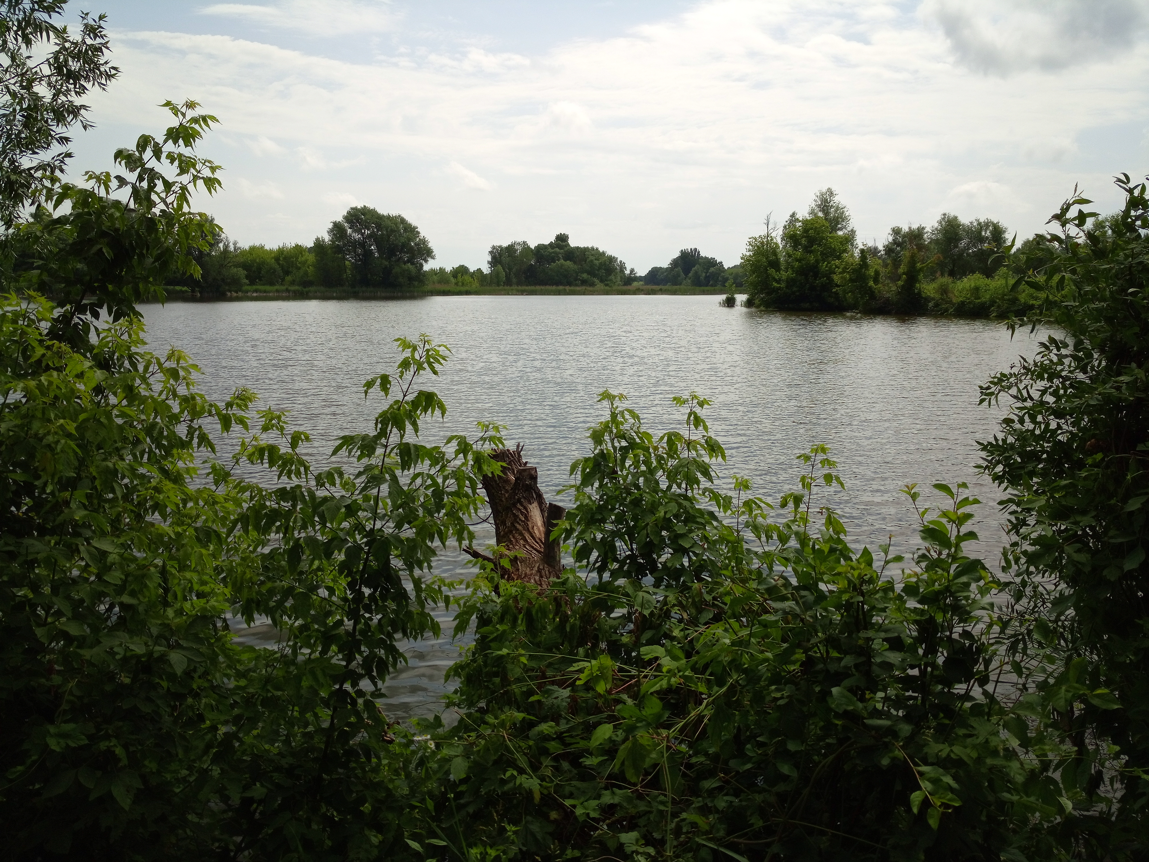 Річка Вербич у межах села Гунчі, верхній ставок (1)